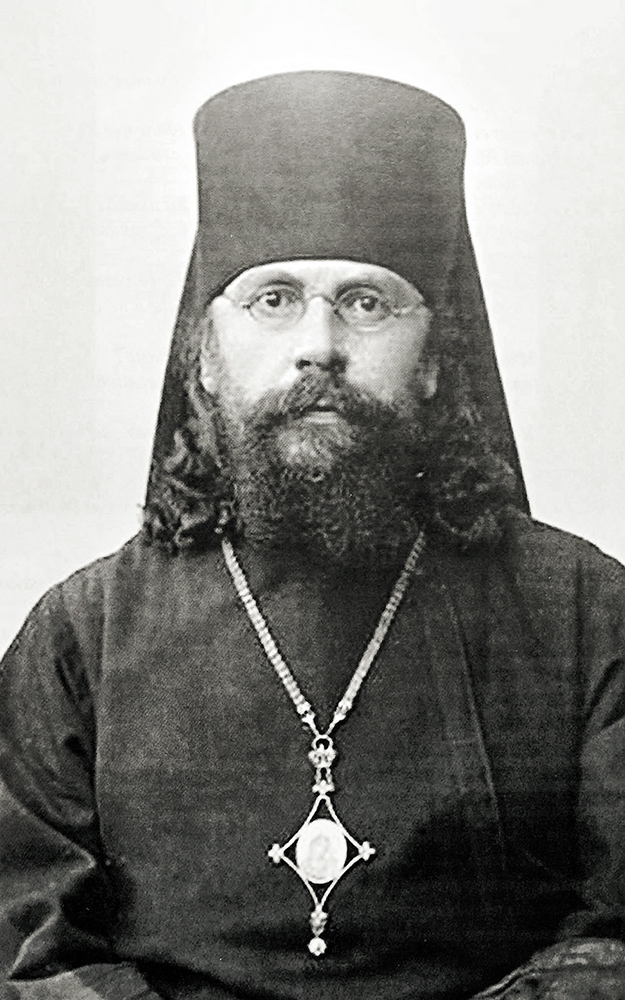 Serafin (Ostroumow), archimandryta monasteru św. Onufrego w Jabłecznej, następnie prawosławny biskup smoleński, rozstrzelany w 1937 w Katyniu w czasie wielkiej czystki